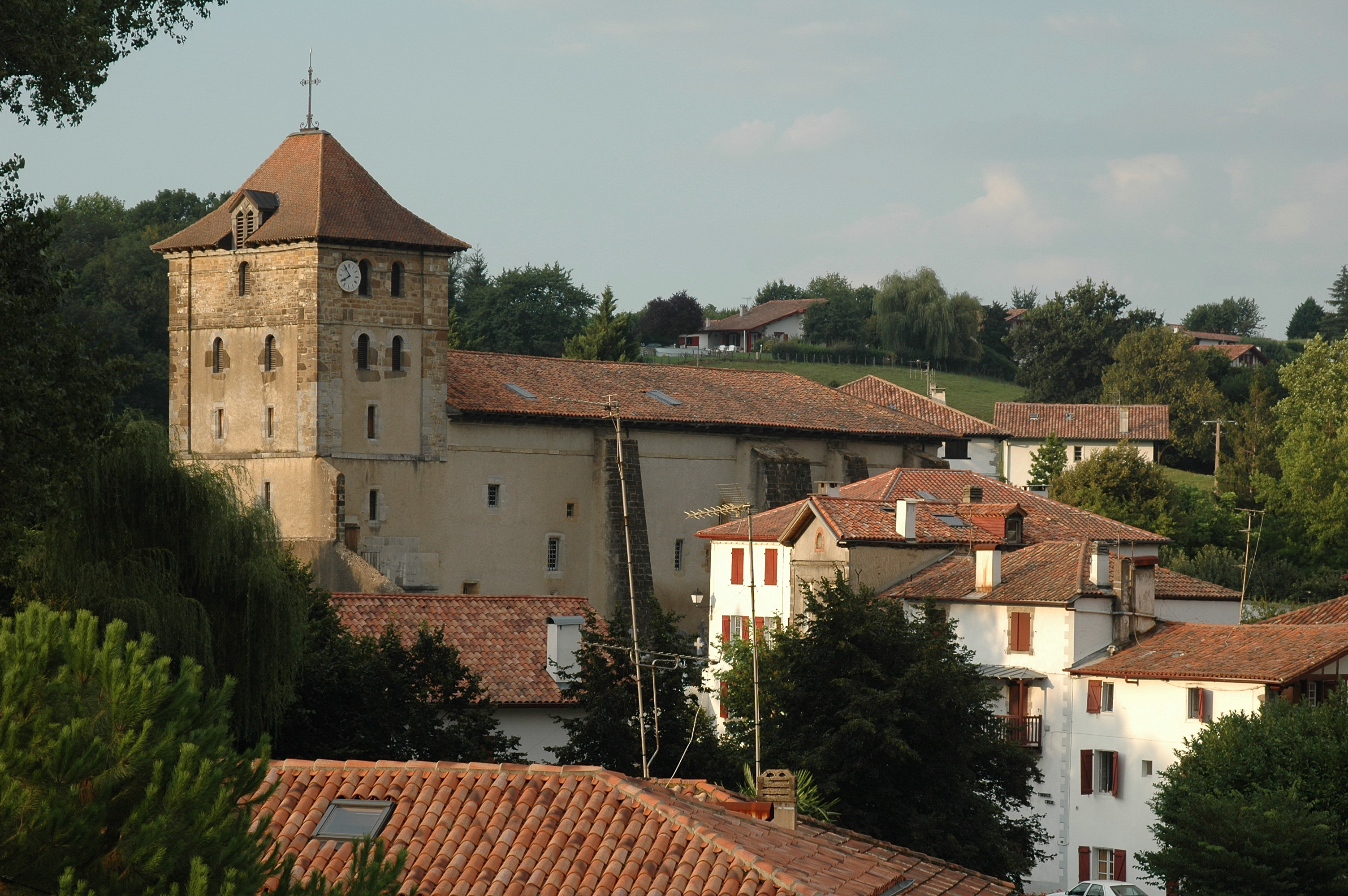 Espelette, l'église. Photo prise le 08/08/06 par Harrieta171